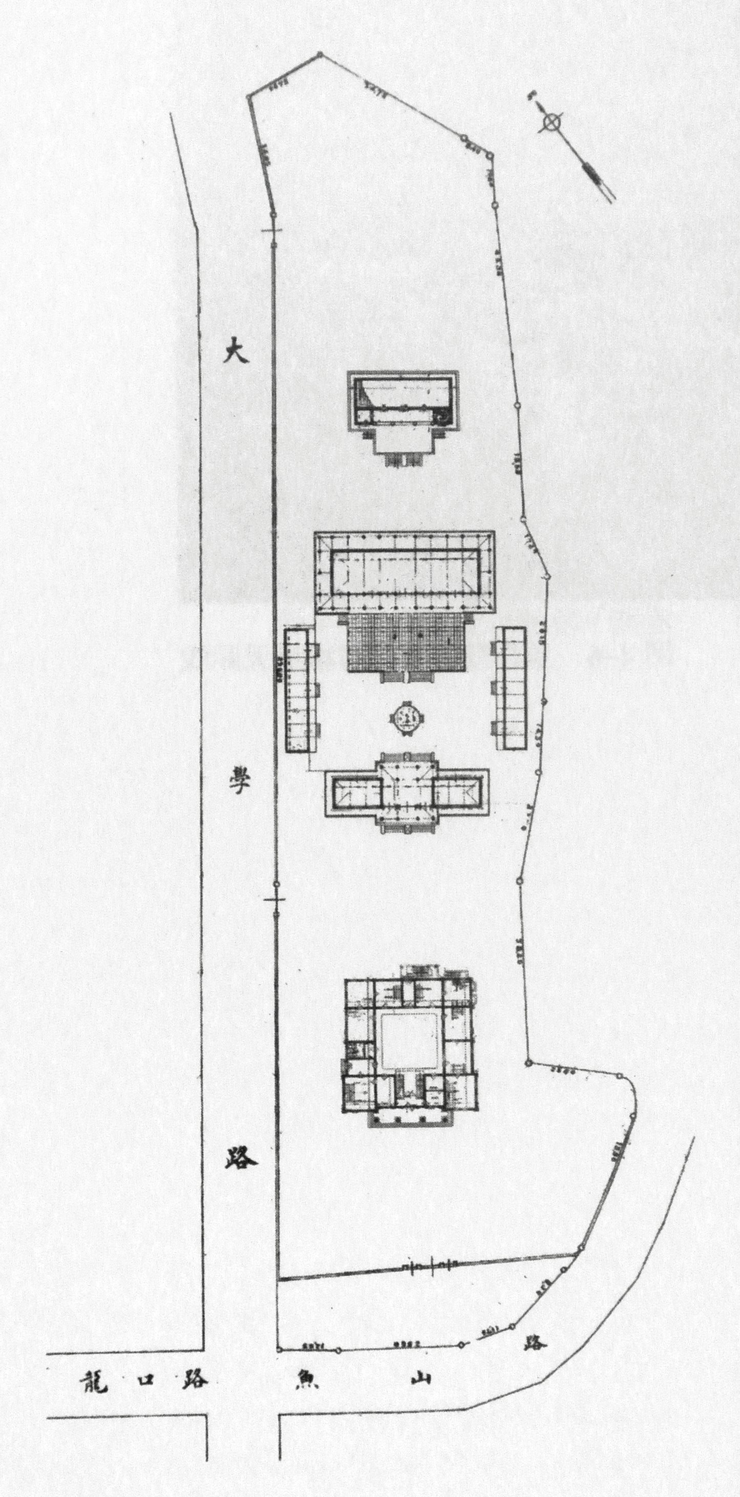 青岛红万字会总平面图